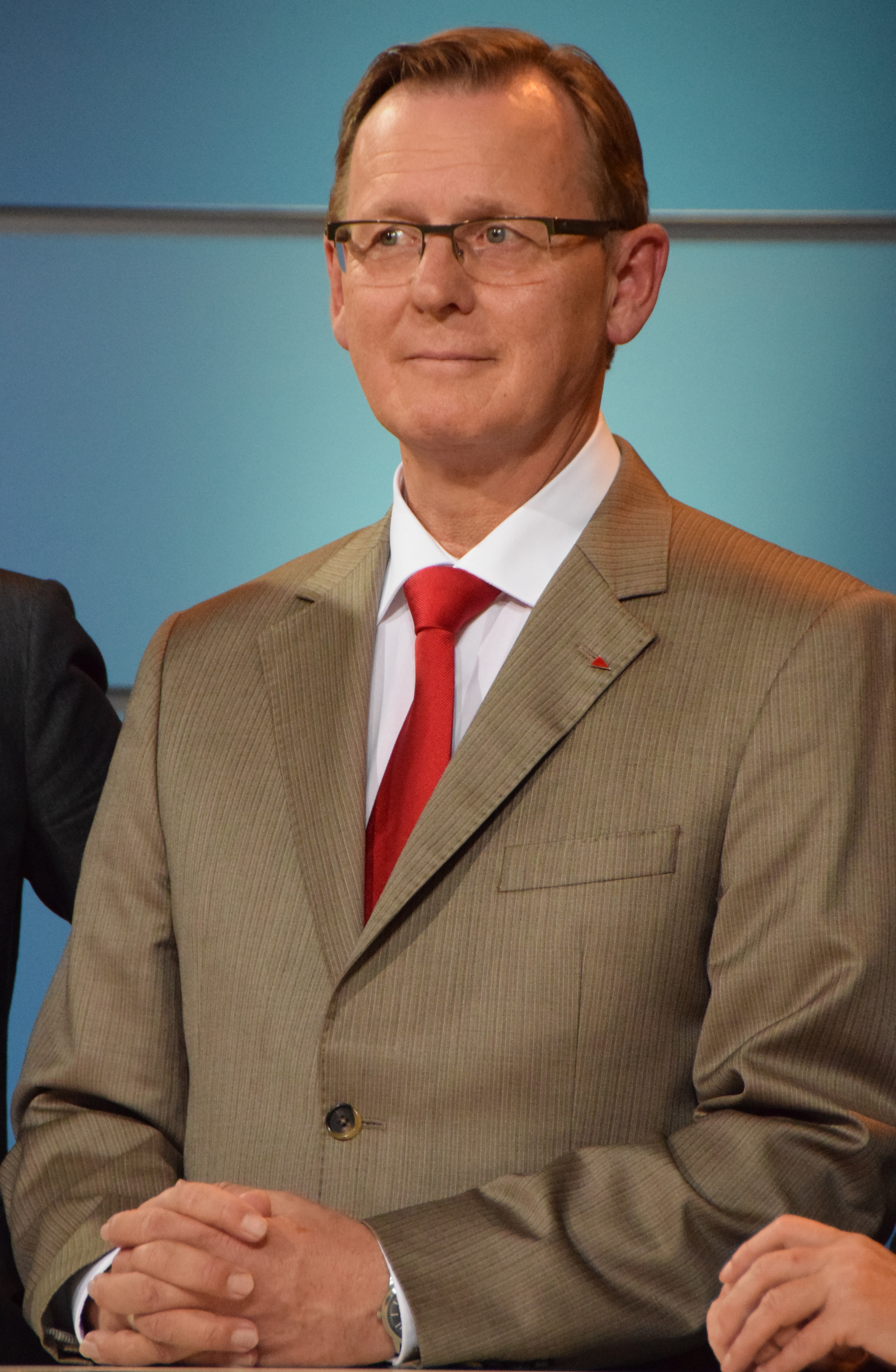 Landtagswahl Thüringen am 14. September 2014